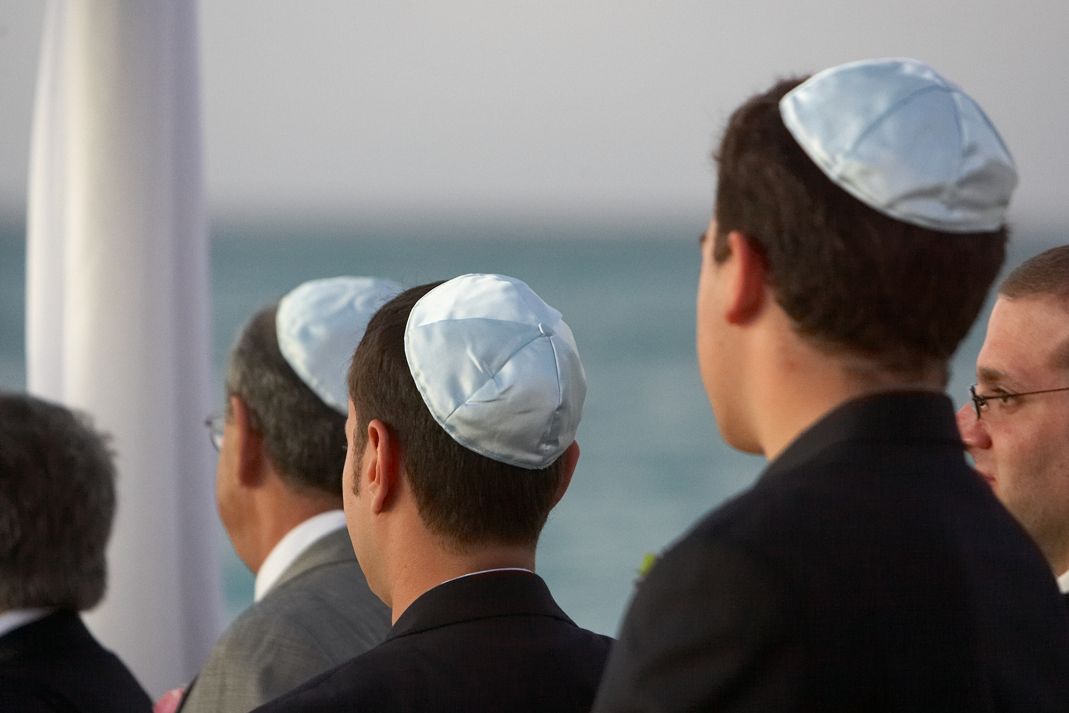 Judeus em um casamento judeu.